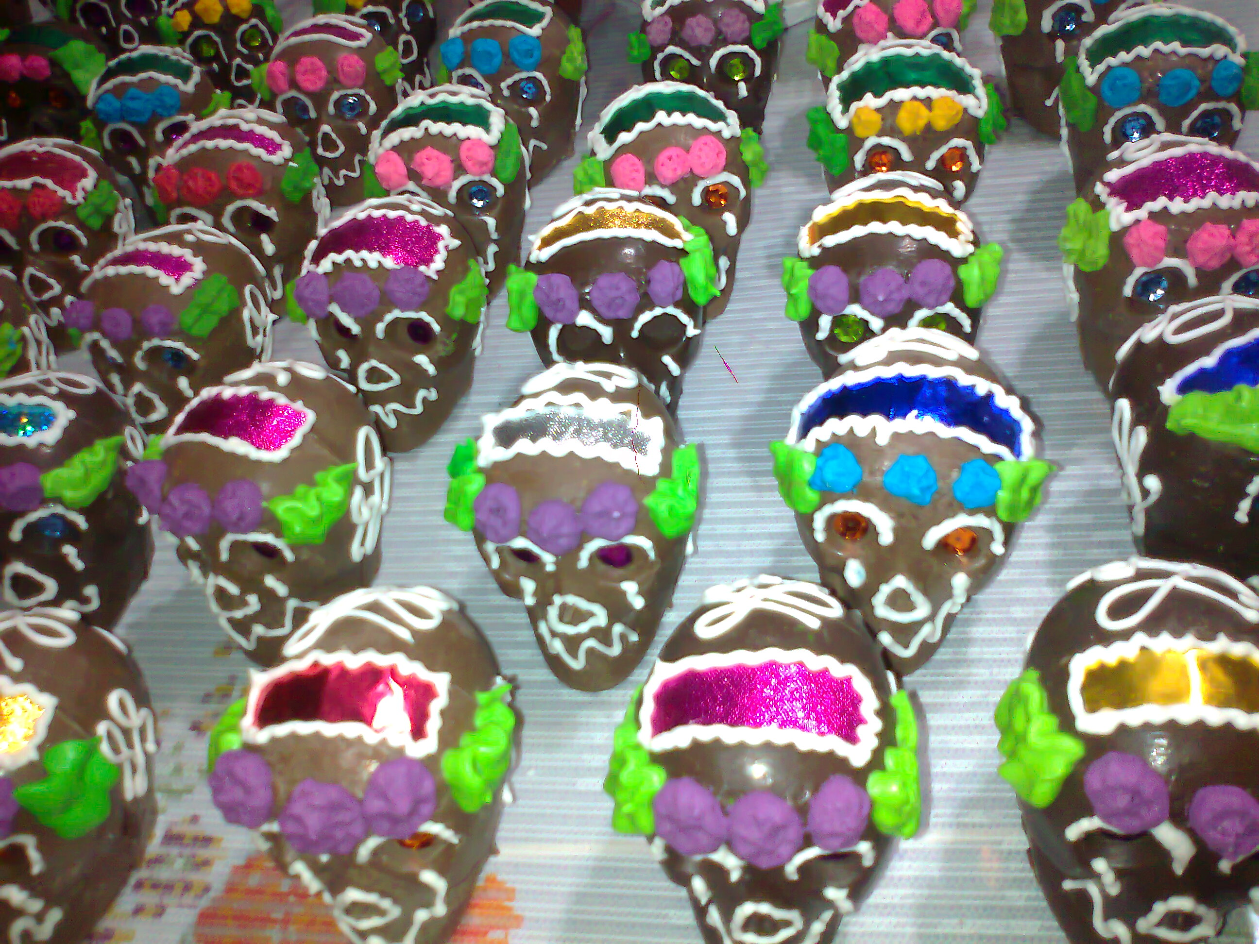 Calaveritas de dia de muertos